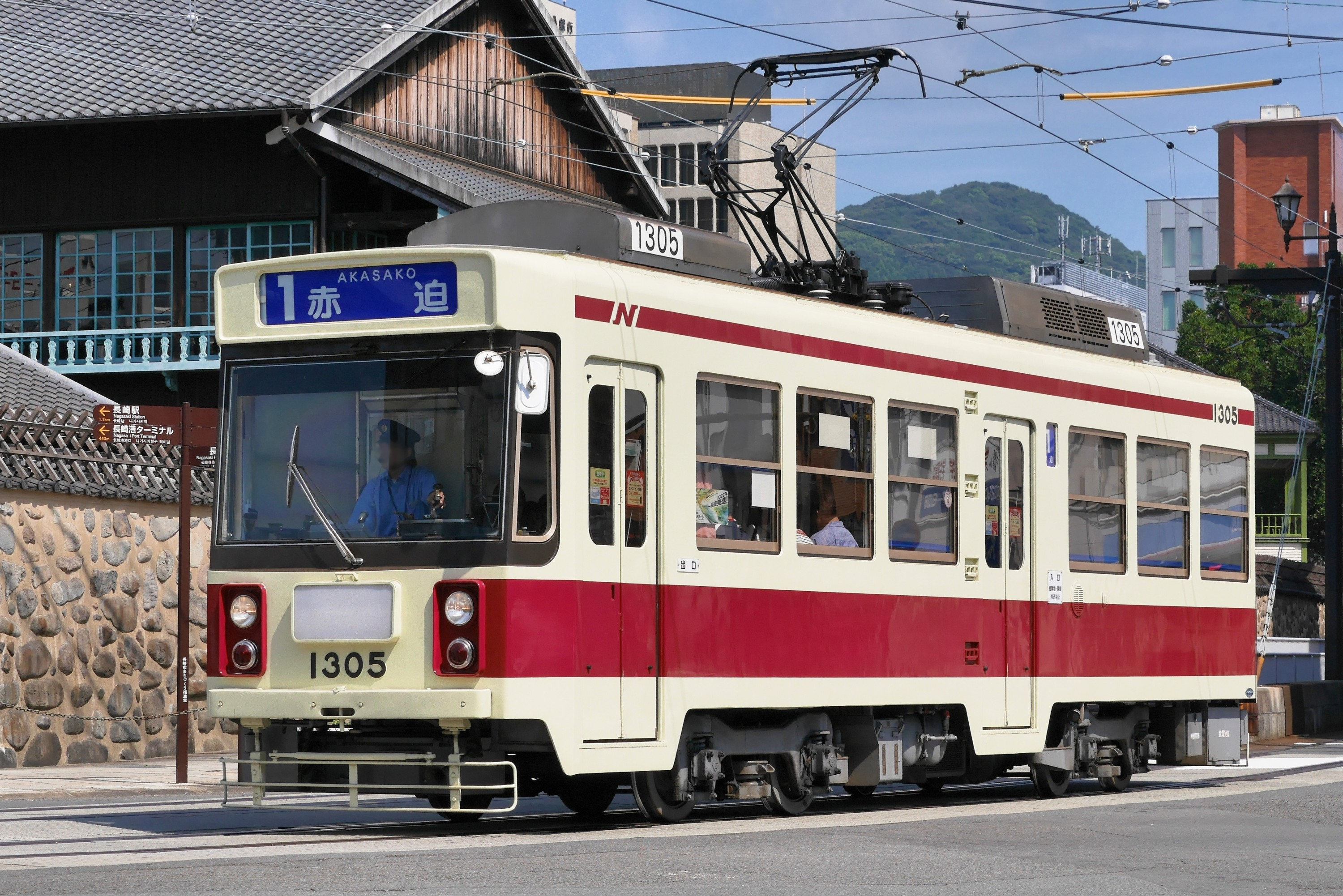 長崎電気軌道の1300形電車1305号。